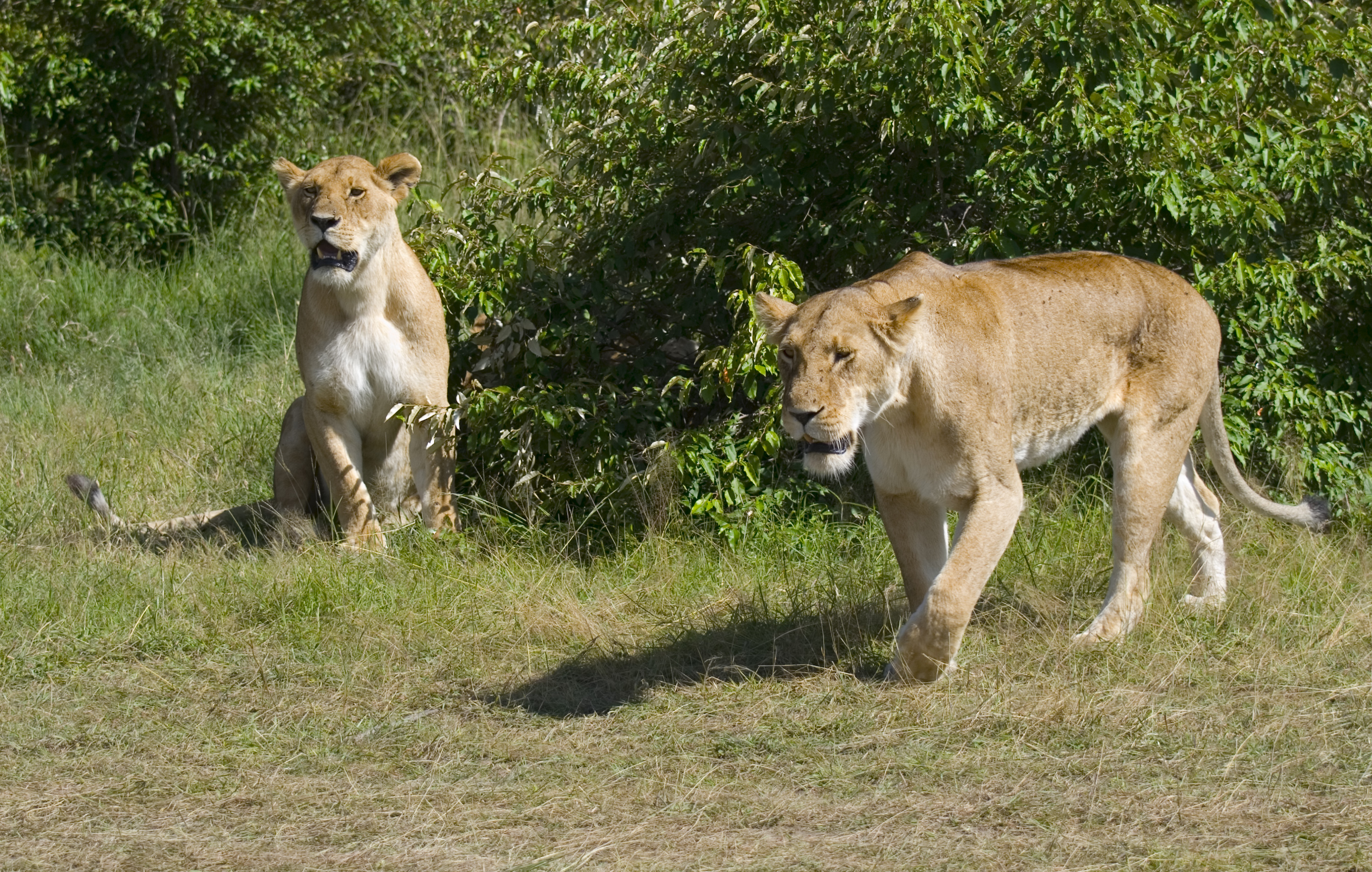 Panthera leo females, Masai Mara, Kenya